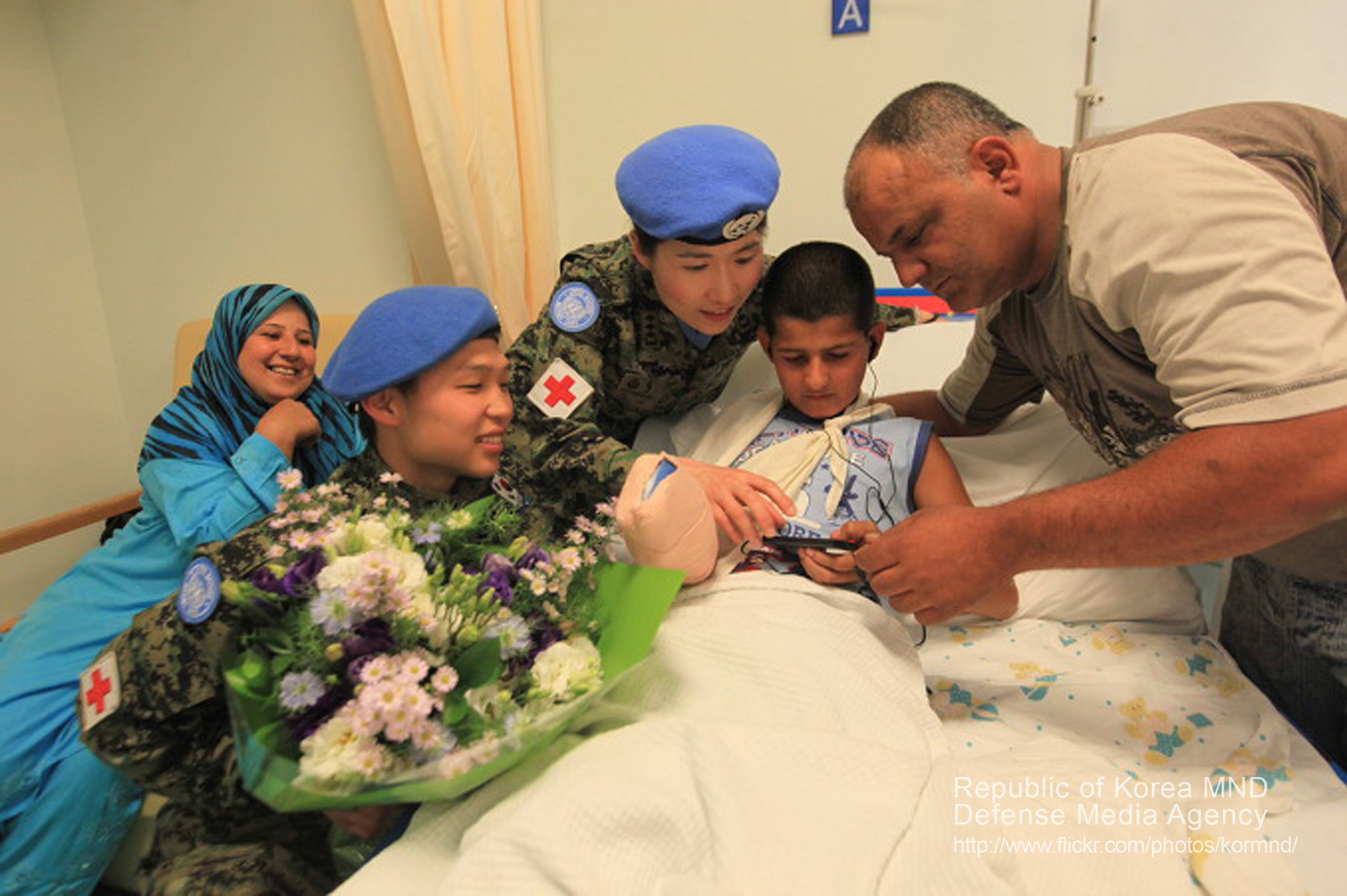 2011 국방화보 Rep. of Korea, Defense Photo Magazine 동명부대 의료진이 수술이 잘 끝나 회복하고 있는 하산 코라니(남, 12세)군을 방문해 MP3를 선물하고 사용법을 설 명해 주고 있다.